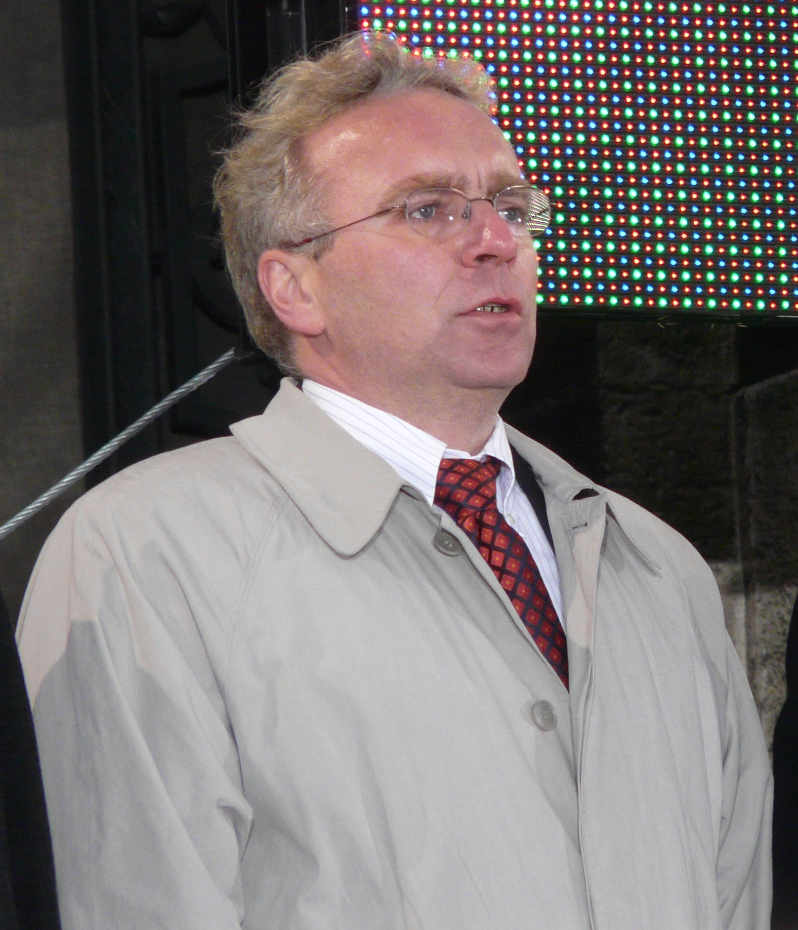 A felvétel 2008 október 23 -án, csütörtökön készült. A FIDESZ Magyar Polgári Párt Budapesten, a Várnegyedben, a Dísz téren tartotta megemlékezését. Orbán Viktor, Pokorni Zoltán. A felvétel megjelent Creative Commons alatt a Metapolisz DVD sorozatban. A kép bal szélén Nagy Gábor Tamás, I. kerületi polgármester.